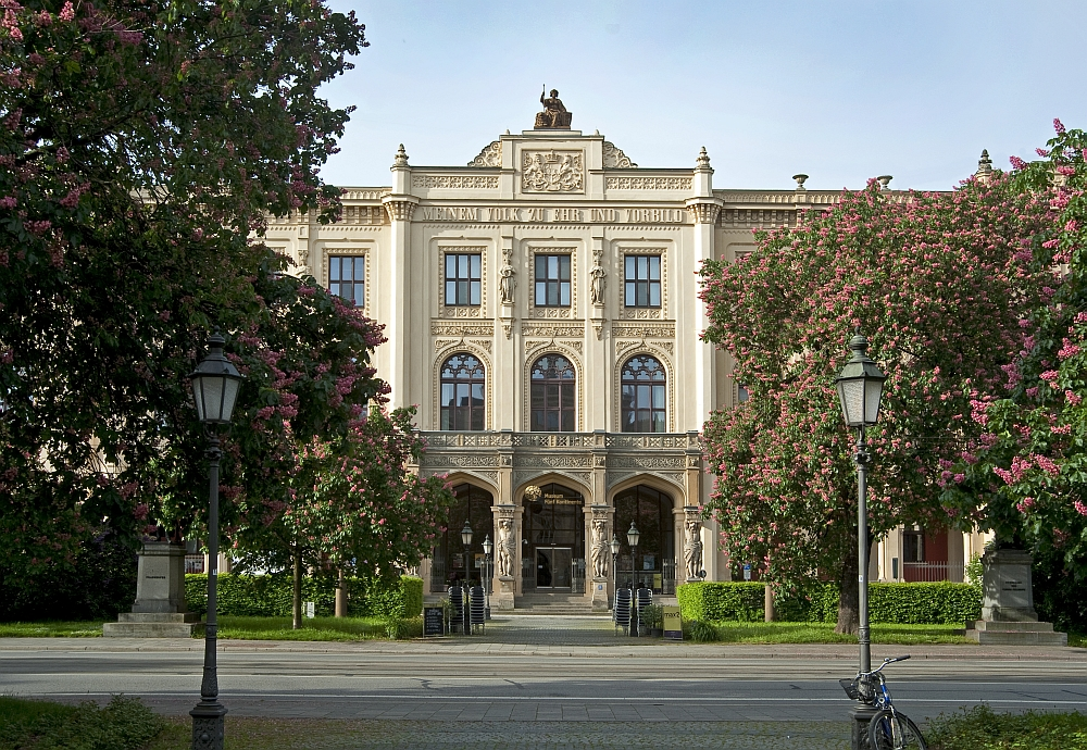 Museum Fünf Kontinente mit neuem Schriftzug über der Fassade